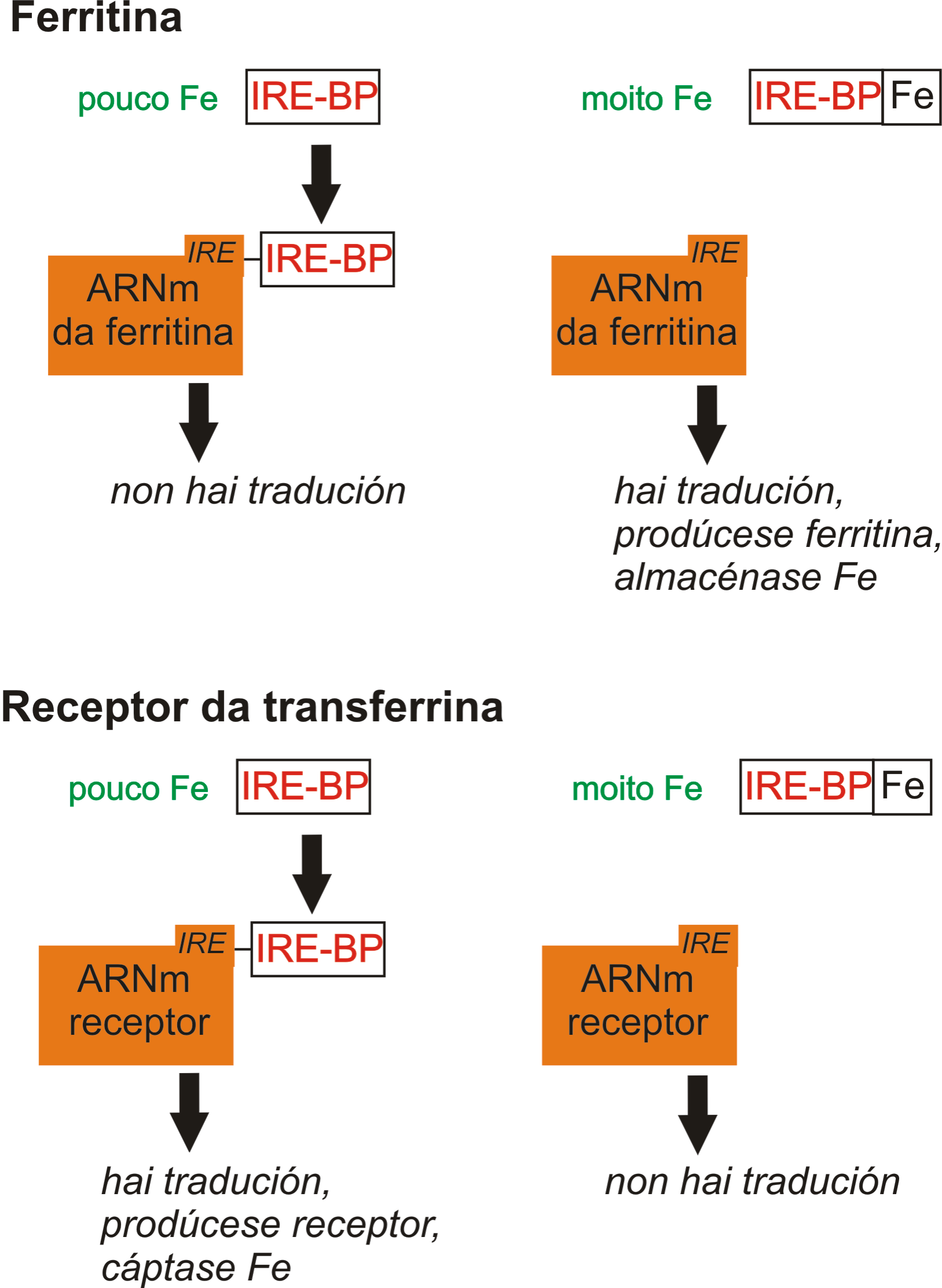 IRE binding protein